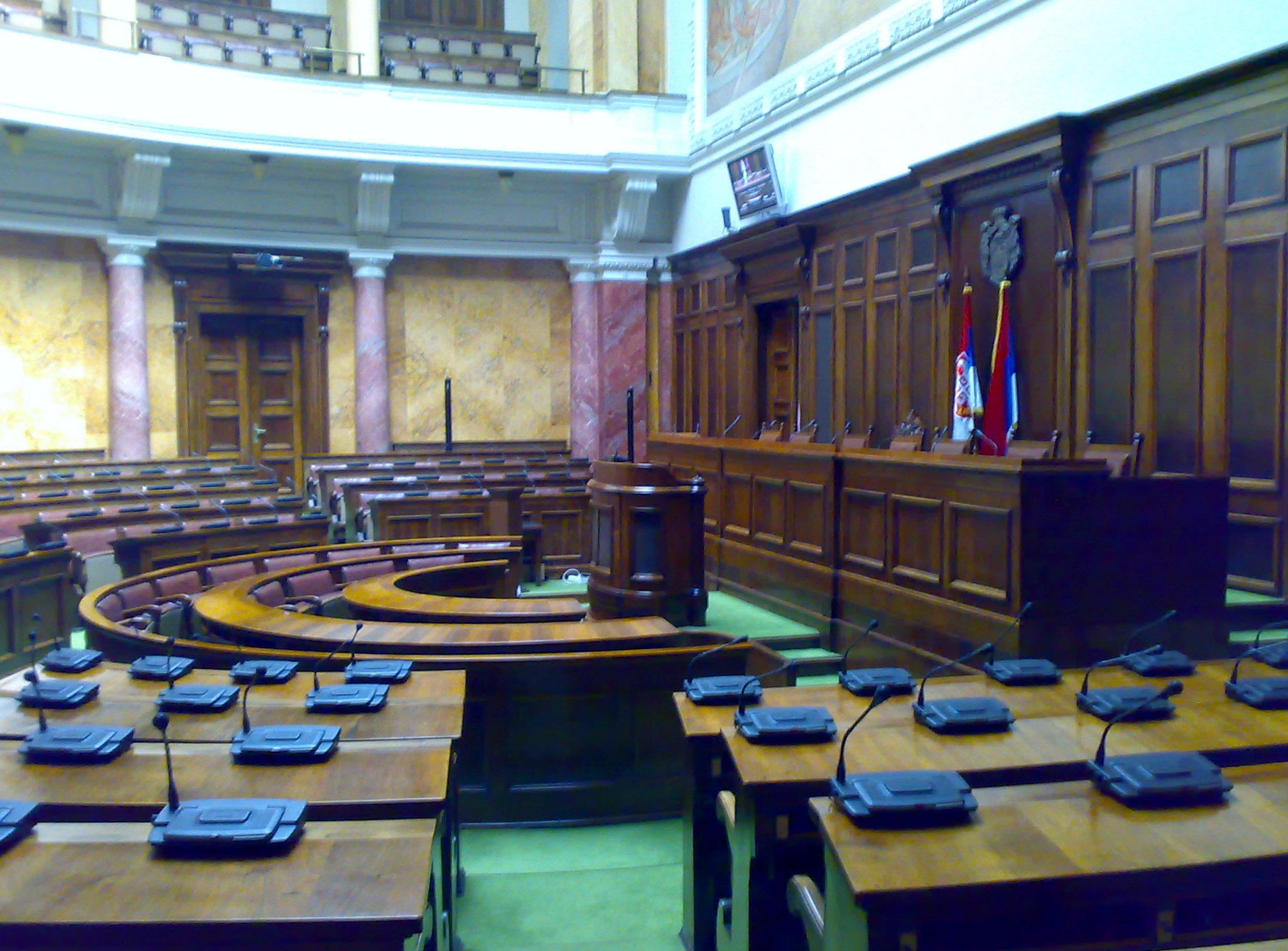 Serbian parliament in Beograd.